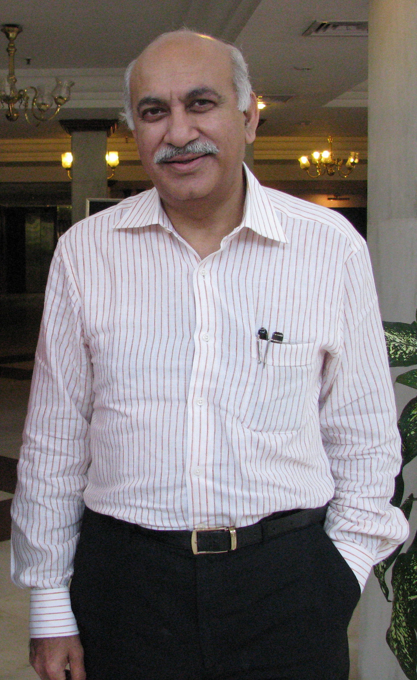 M. J. Akbar